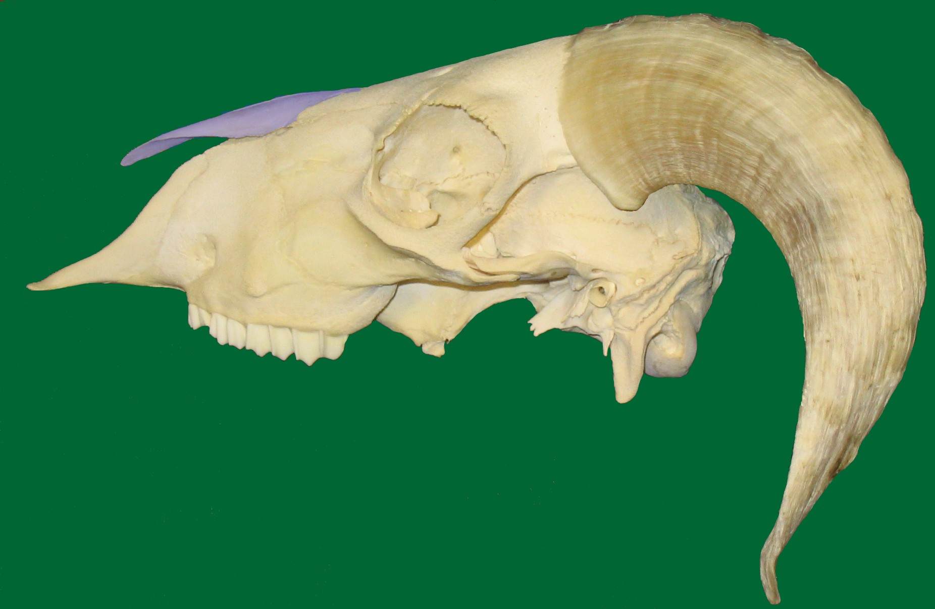 Skull of a sheep. nasal bone (Os nasale) coloured.Schädel eines Schafes. Nasenbein (Os nasale) farbig markiert.